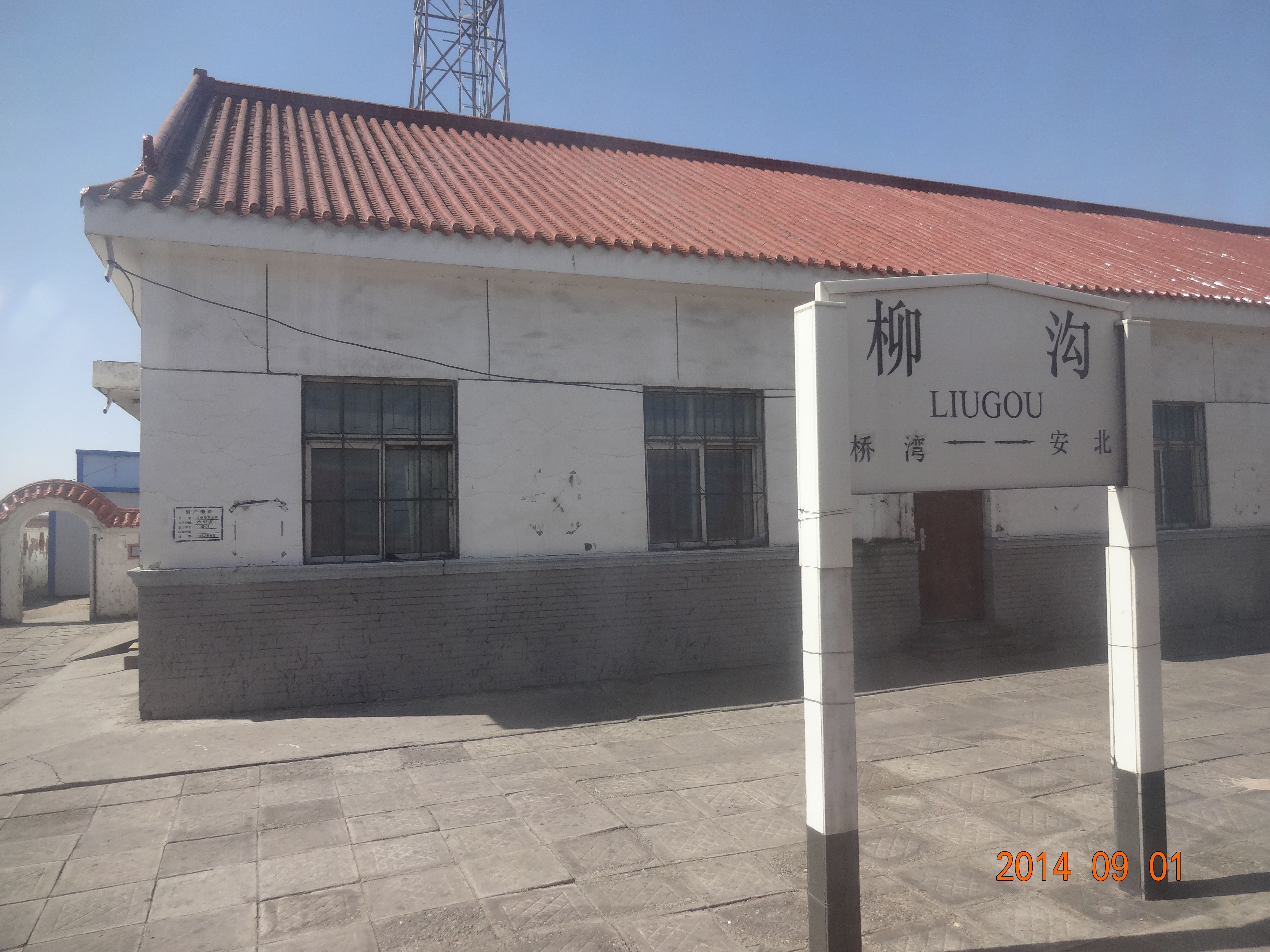 柳沟站